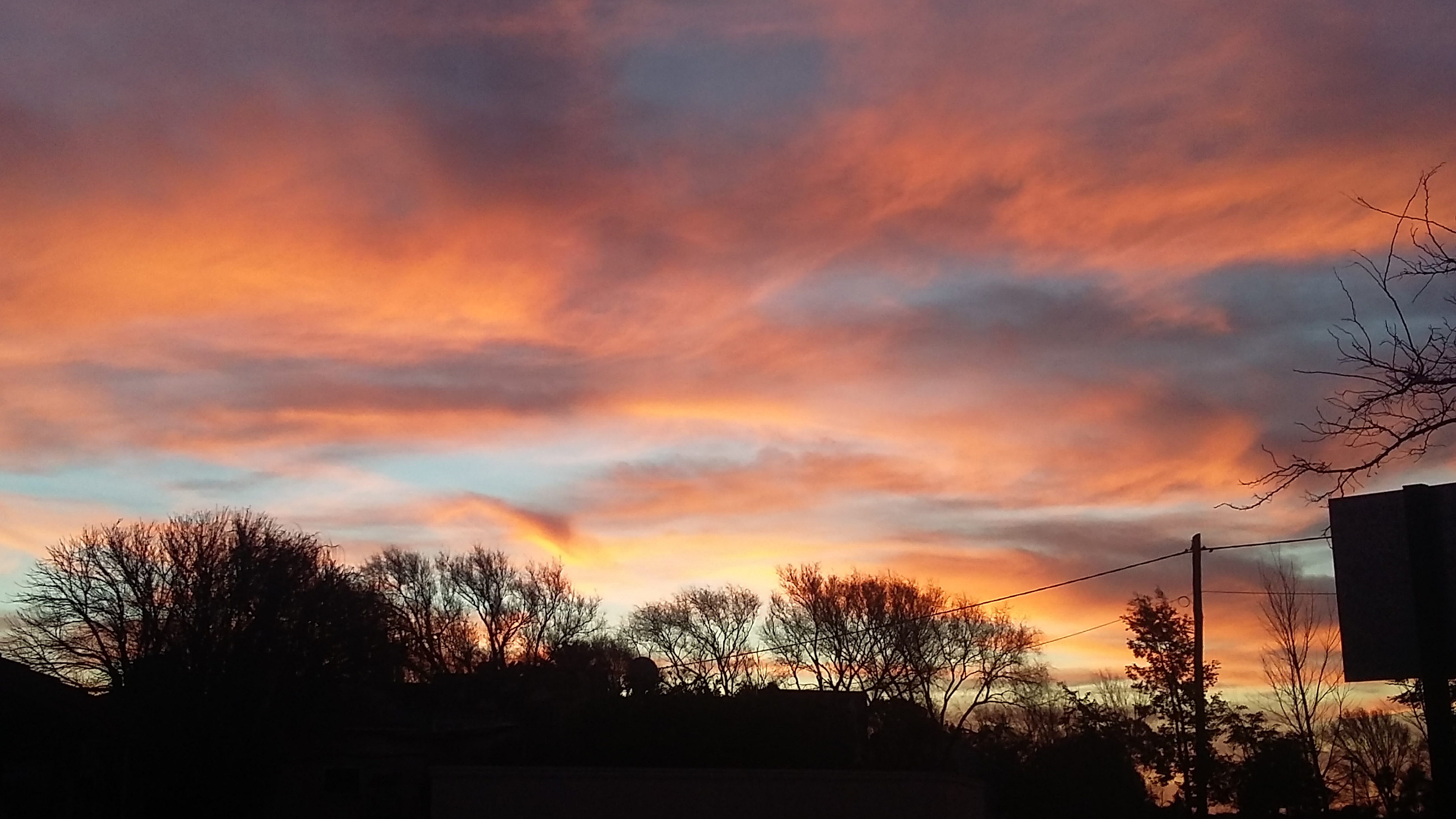 Como todos los días,el hermoso atardecer hace su aparición en nuestro cielo Pampeano y sorprende con sus Maravillosos Colores.Paisaje Natural de Bernardo Larroude (La Pampa)